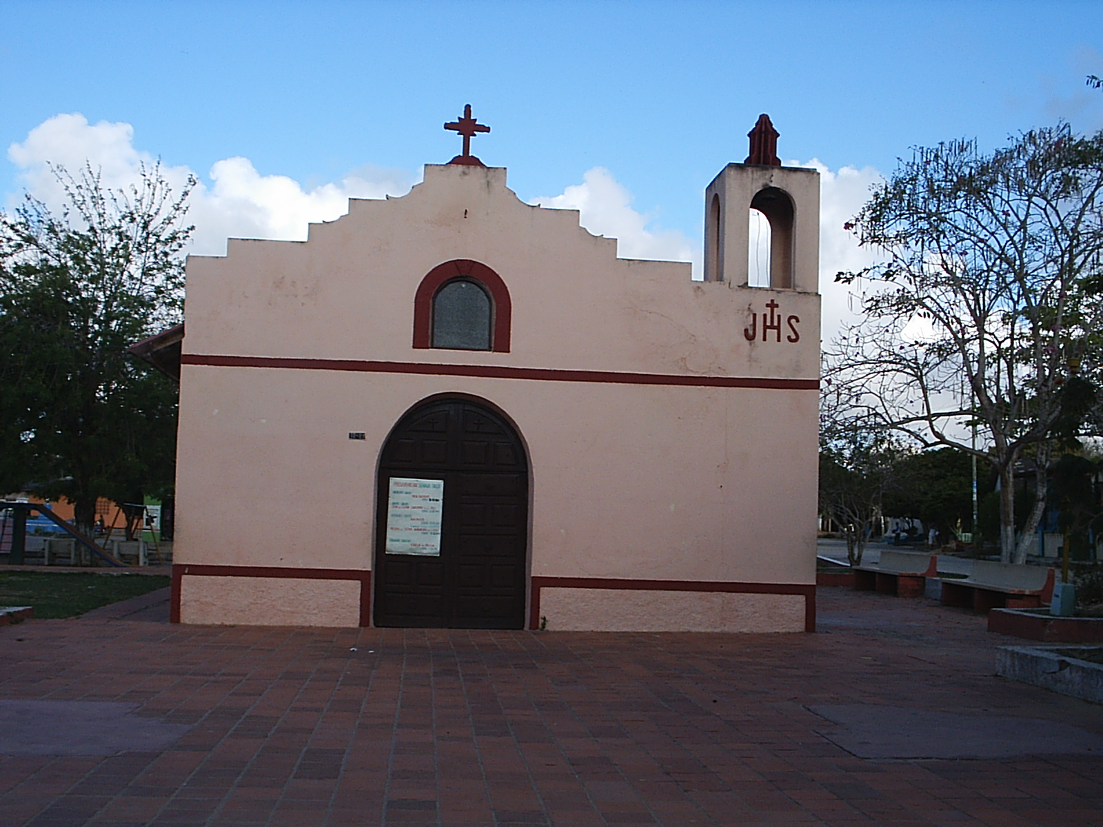 Capilla San Isidro Labrador